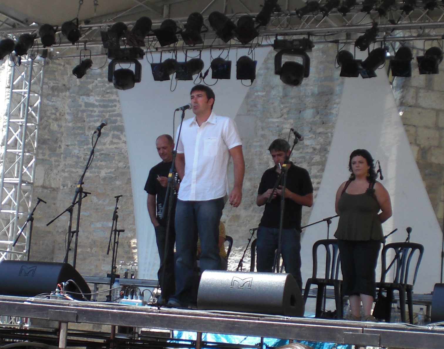 Asier Otamendi bertsolaria Gasteizko jaietan.